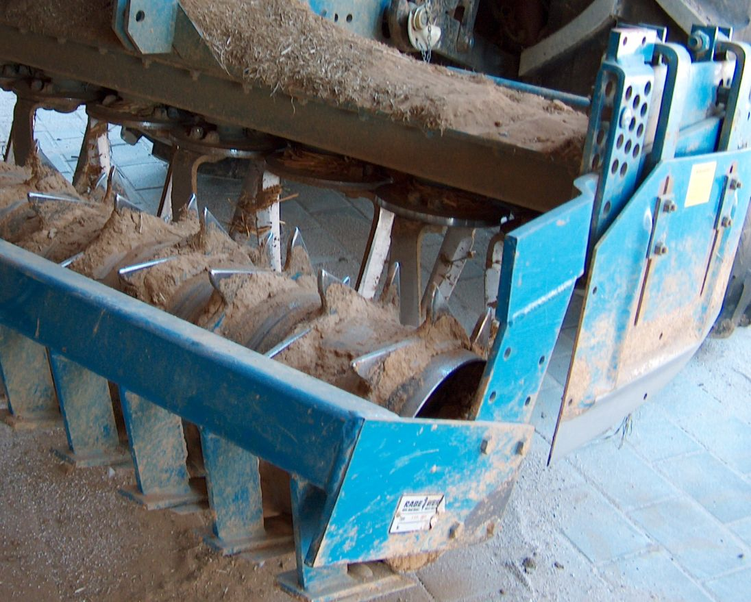 Details einer Kreiselegge der Firma Rabe Agrarsysteme, Zinken im Hintergrund und Nachläuferwalze im Vordergrund